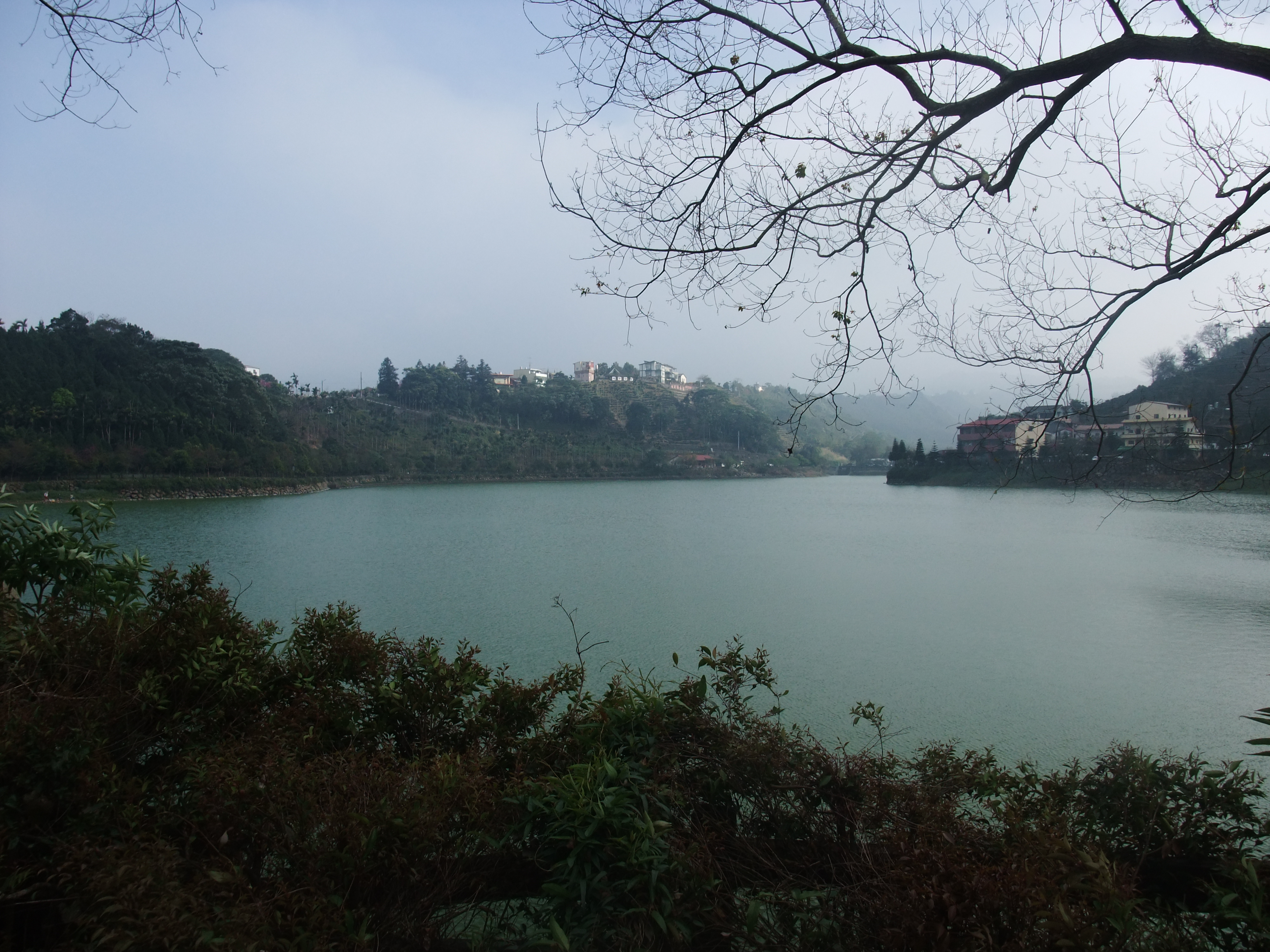 南投縣鹿谷鄉麒麟潭